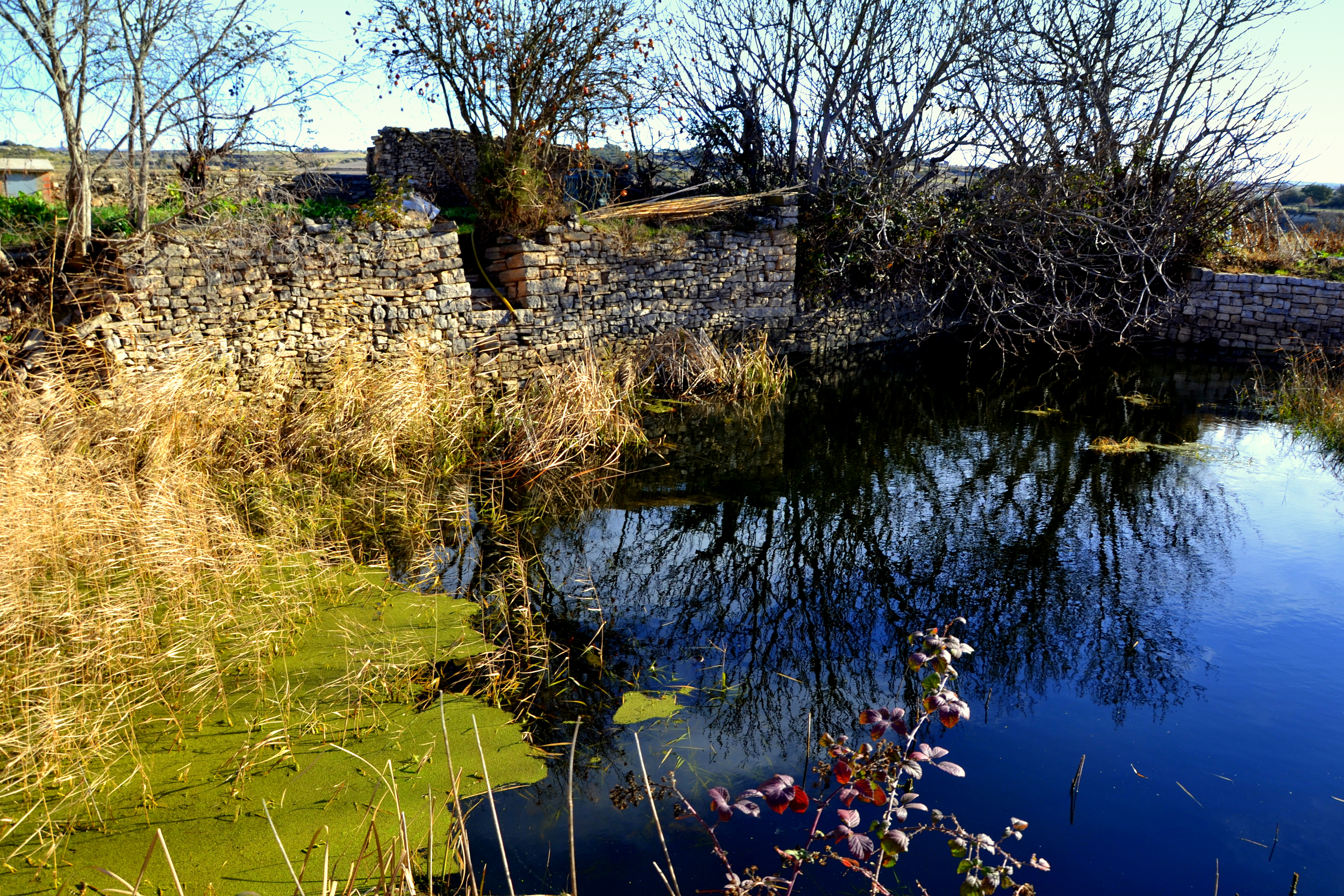 Granyena This is a a photo of a natural area in Catalonia, Spain, with id: ES510254